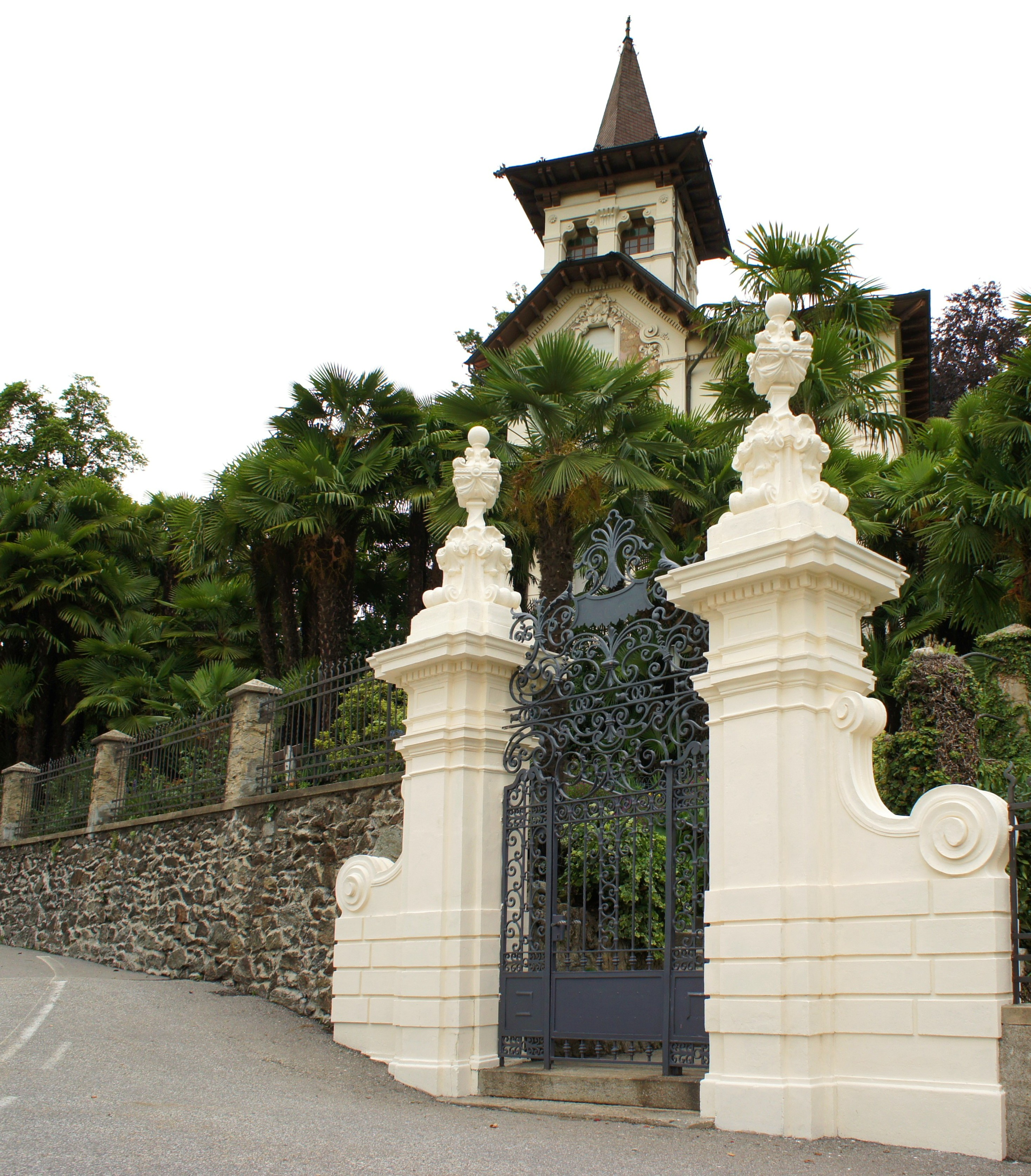 Capriasca, Switzerland